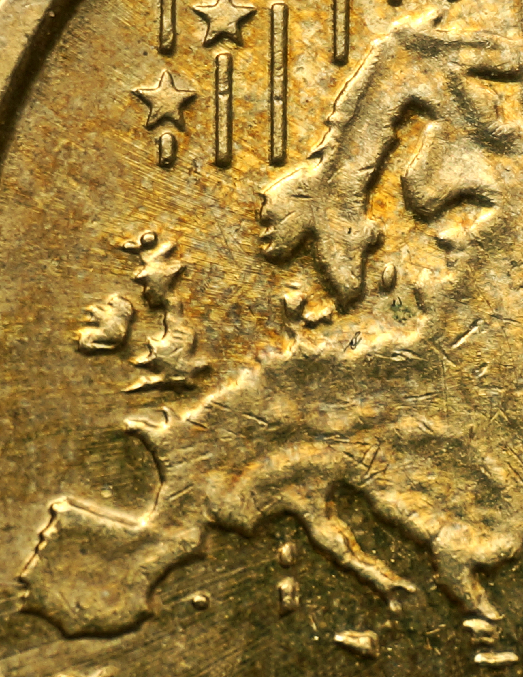 Europa, Ausschnitt aus der 20-Eurocent-Münze